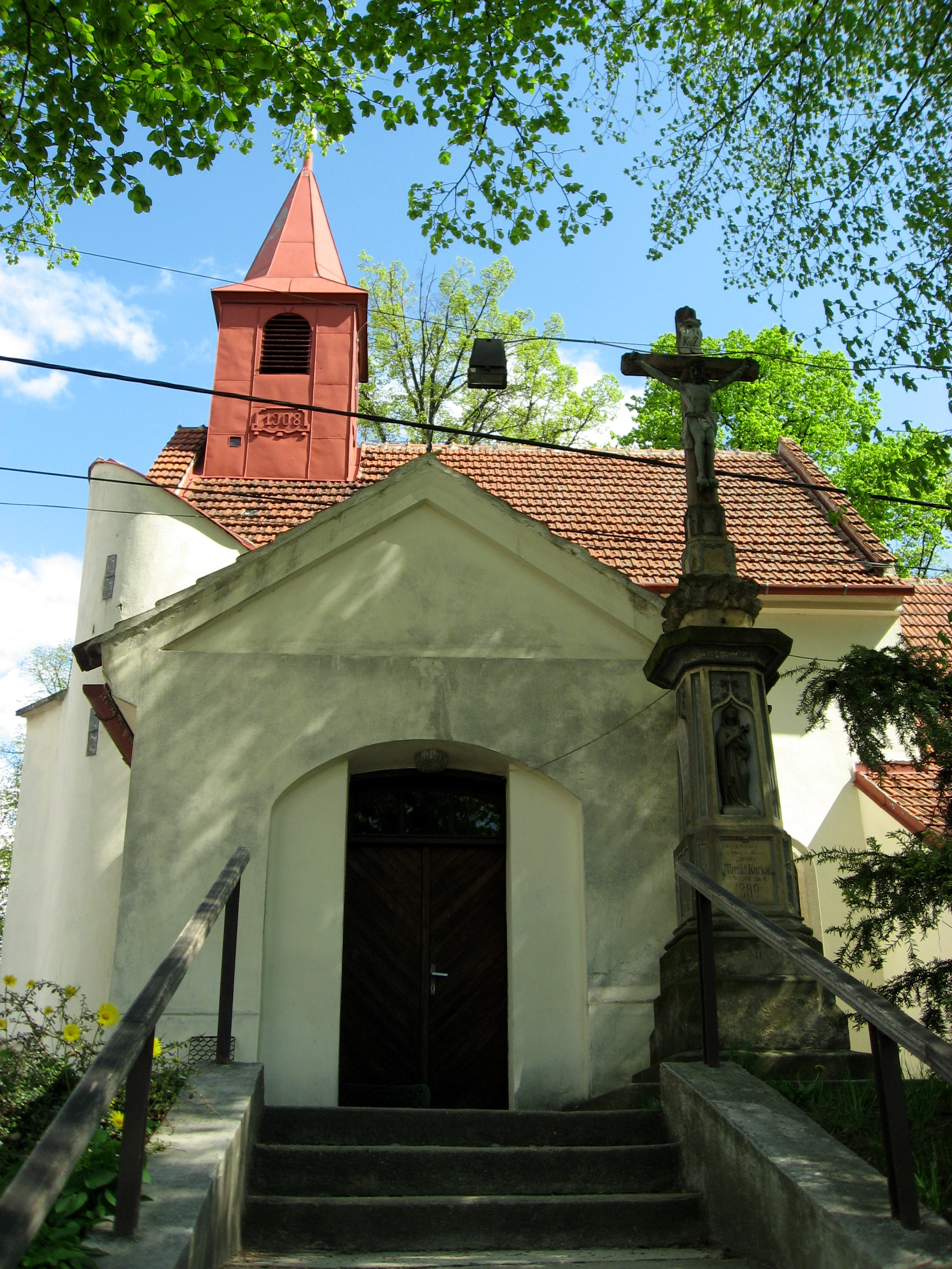 Nebovidy, kostel sv. kříže